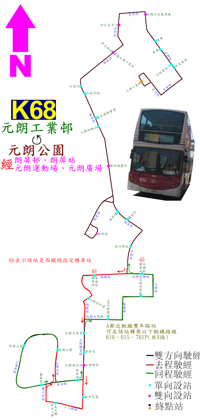 中文（香港）: 港鐵巴士K68線的地圖式路線圖